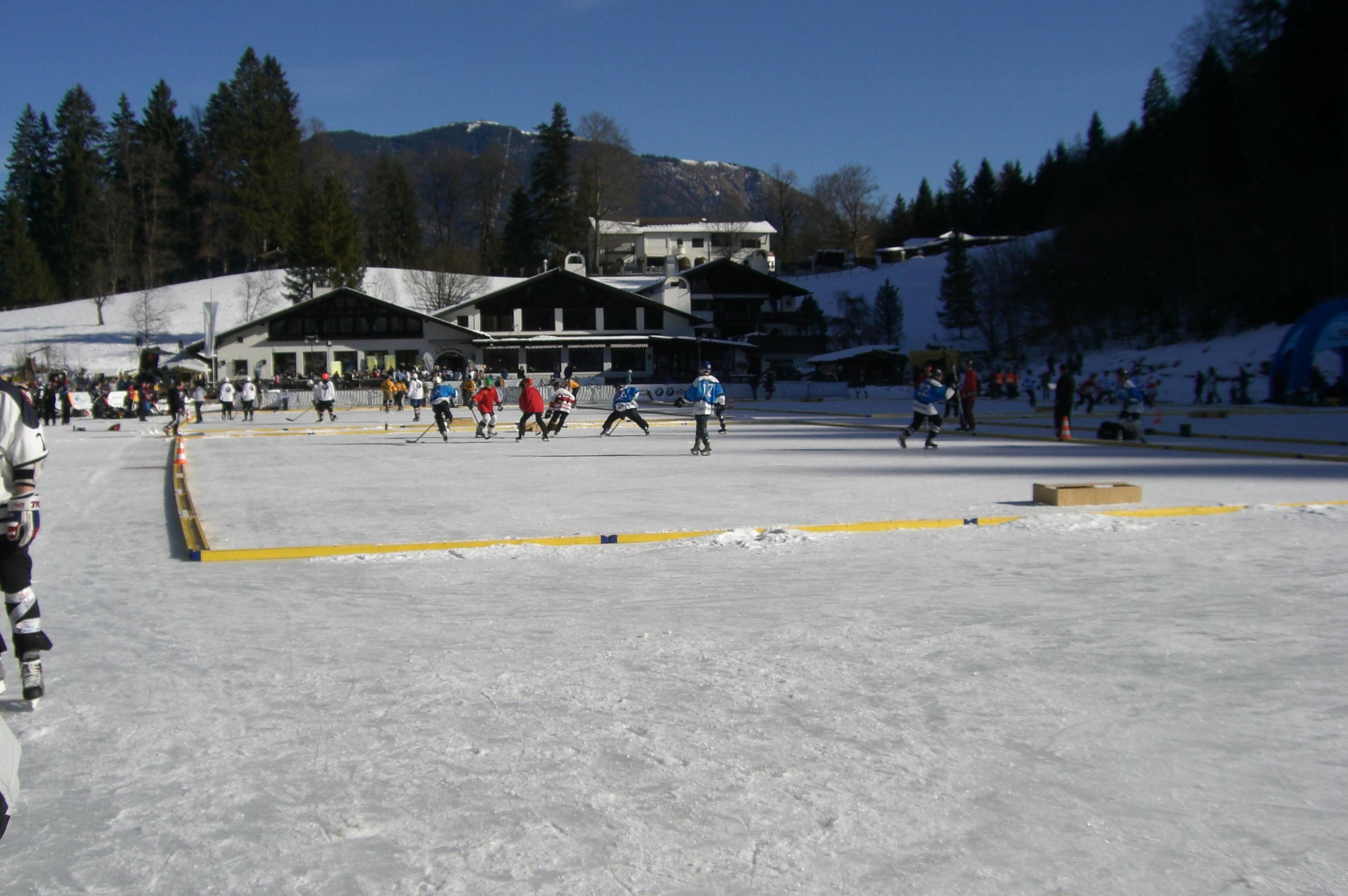 Aufgenommen bei dem 1. Pond Hockey Cup 2011 am Riessersee in Garmisch-Partenkirchen. Der Blick ist in Richtung Hotel Rießersee gerichtet.